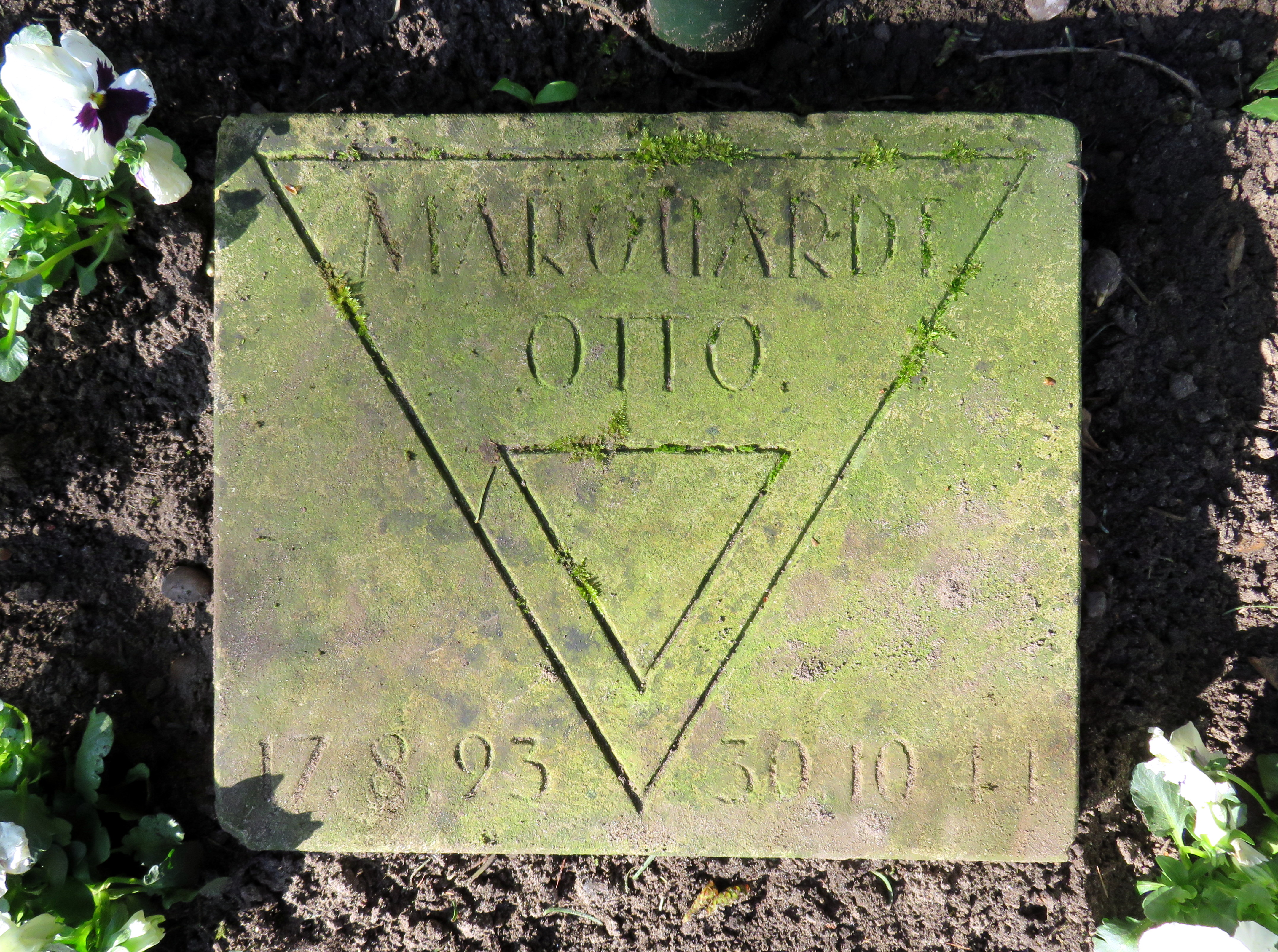 Kissenstein für den deutschen Widerstandskämpfer Otto Marquardt im Ehrenhain Hamburgischer Widerstandskämpfer, Friedhof Ohlsdorf, Planquadrat K 5 (Bergstraße gegenüber dem Museum).